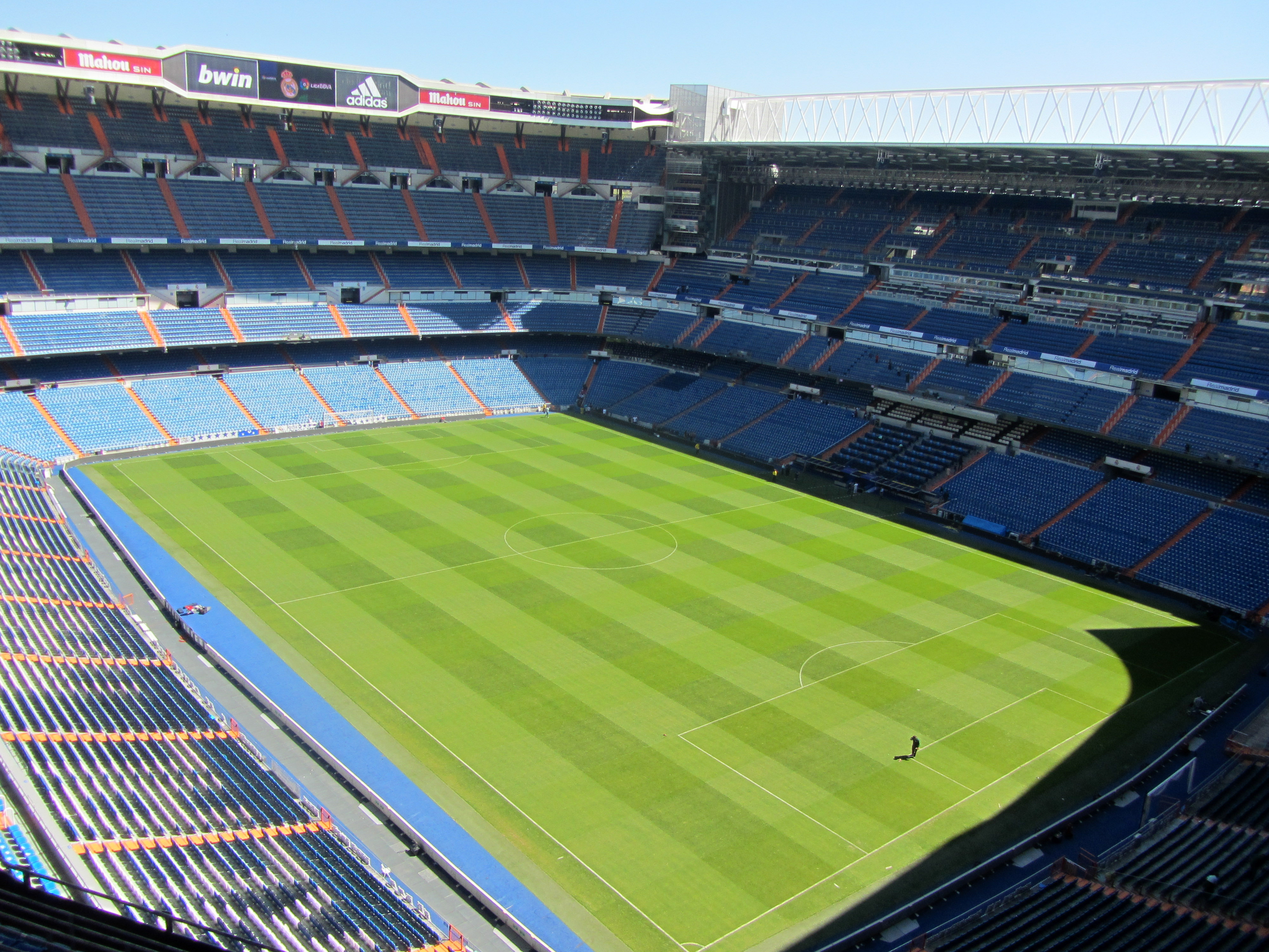 Estadio Santiago Bernabéu Mai 2013